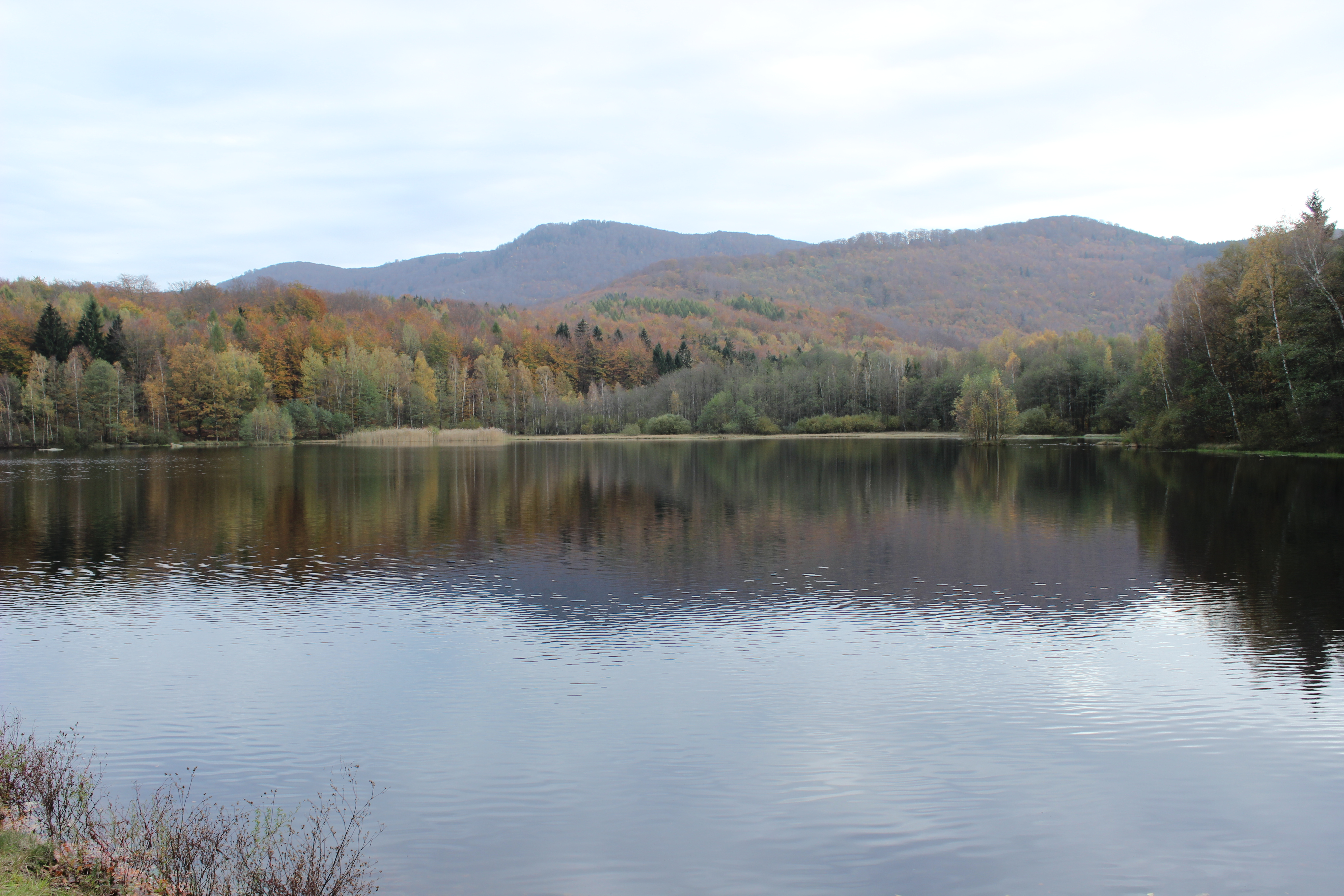 Šolcův rybník na úpatí severních svahů Jizerských hor.